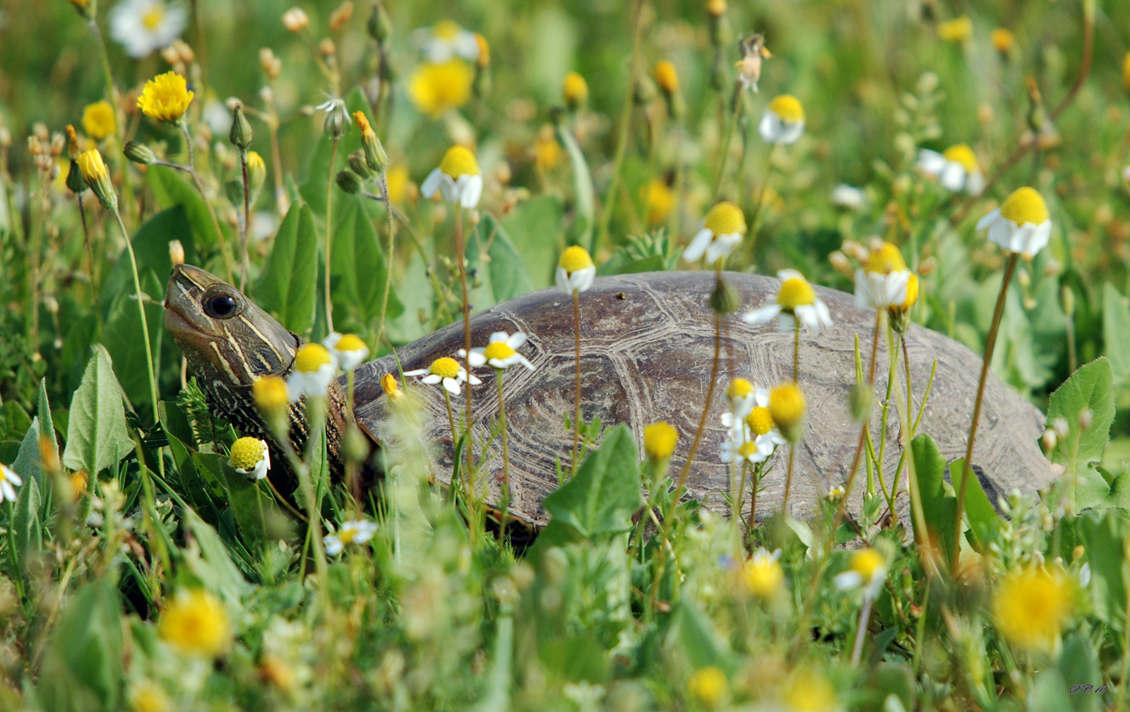 Kurdî: Ji Kemberlû ya Xetîbegê